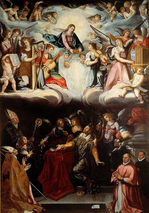 La obra representa el tránsito hacia la gloria del príncipe visigodo San Hermenegildo, que fue ejecutado por orden de su padre por su conversión a la fe católica.